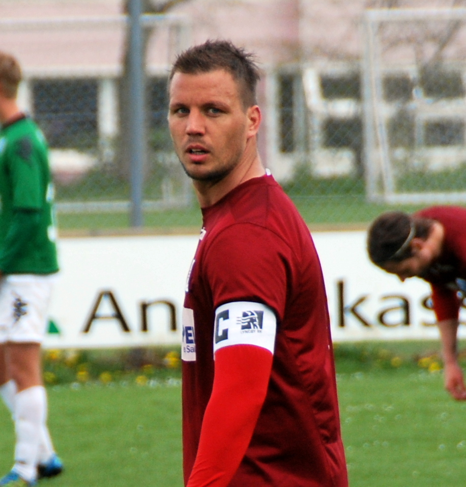 Fodboldspilleren Kim Aabech fra Lyngby Boldklub. Her under en reservekamp mod Viborg FF på Viborgs træningsanlæg på Kirkebækvej.